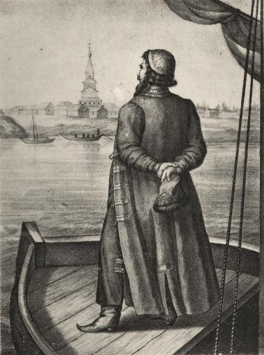 Русская одежда в XIV до XVIII столетия, однорядка тафья и шапка. (Вид изображает Патриаршее-Село Медной, близ Твери, в XVII столетии).